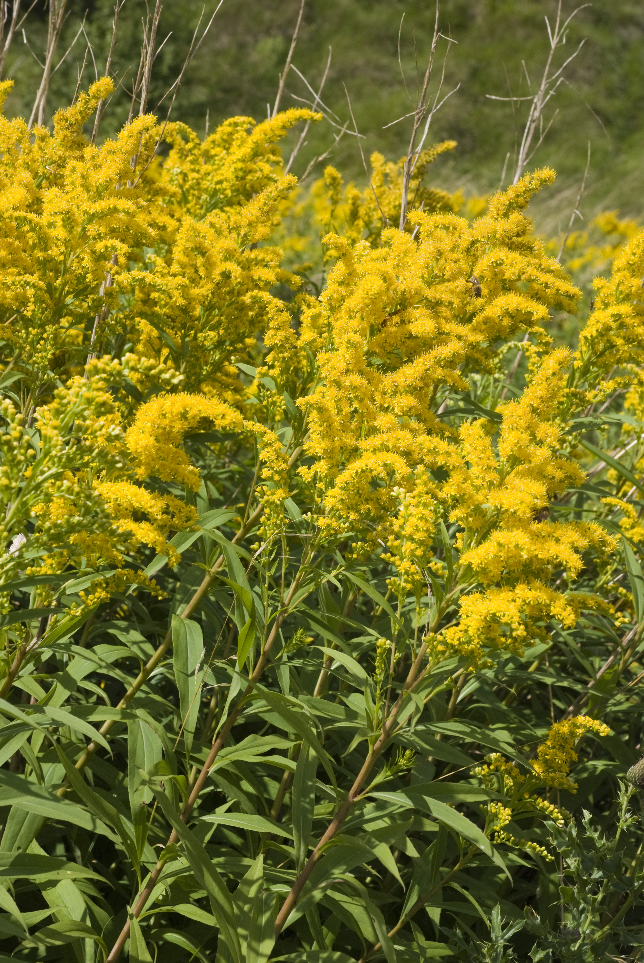 Solidago canadensis Vallée de Grâce à Amiens (Somme), France